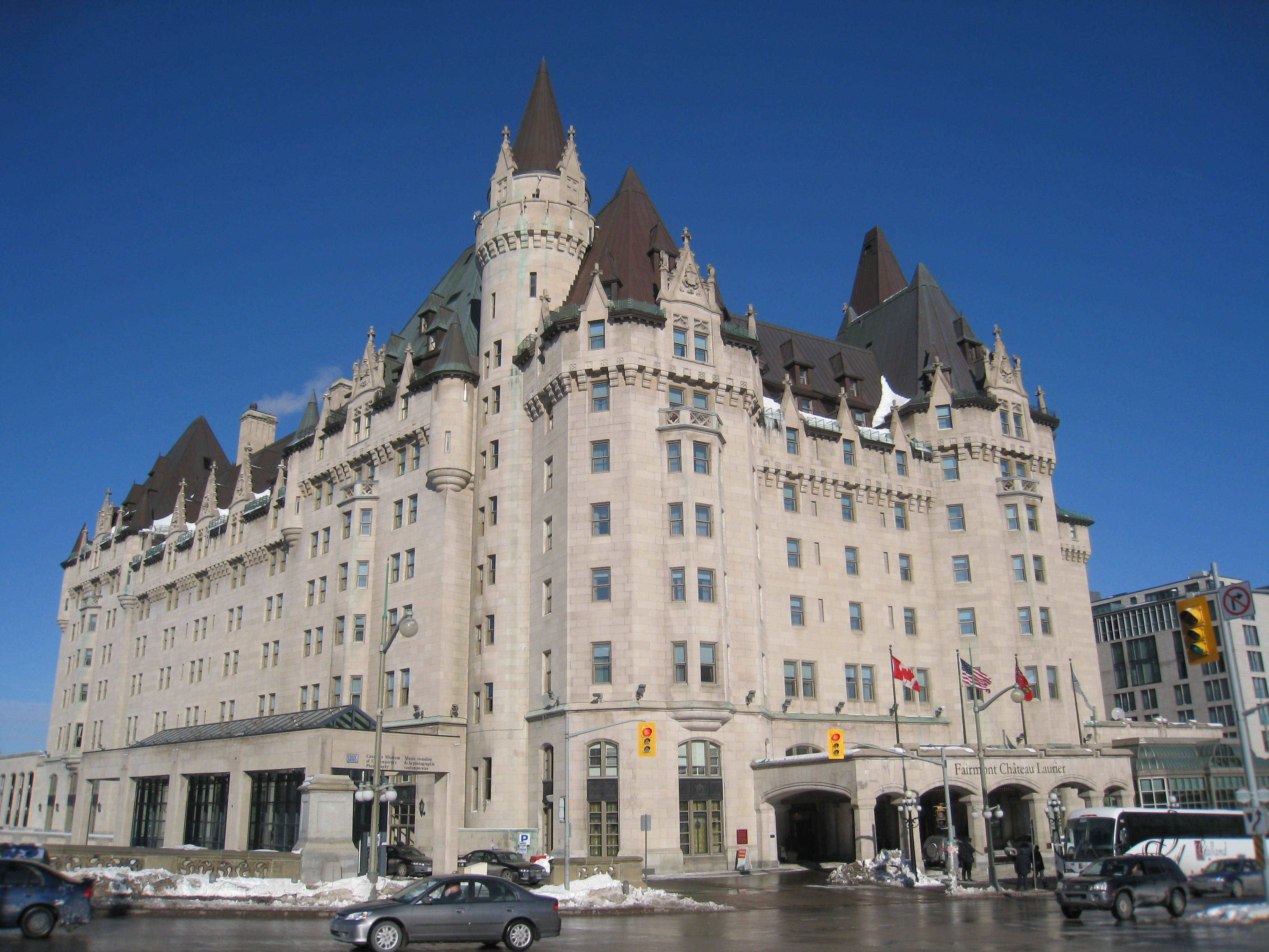 Fairmont Chateau Laurier